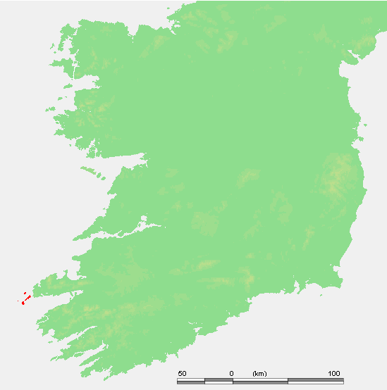 Ireland - Blasket Islands.PNG